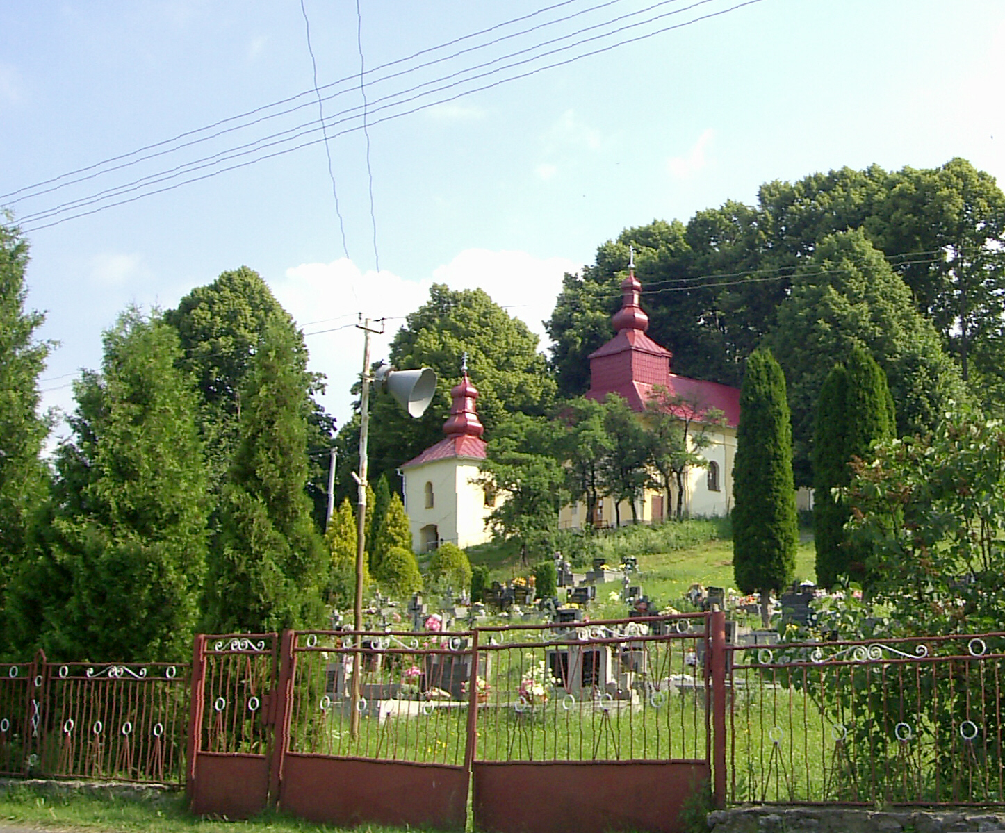 Čabalovce, Grécko-katolícky kostol